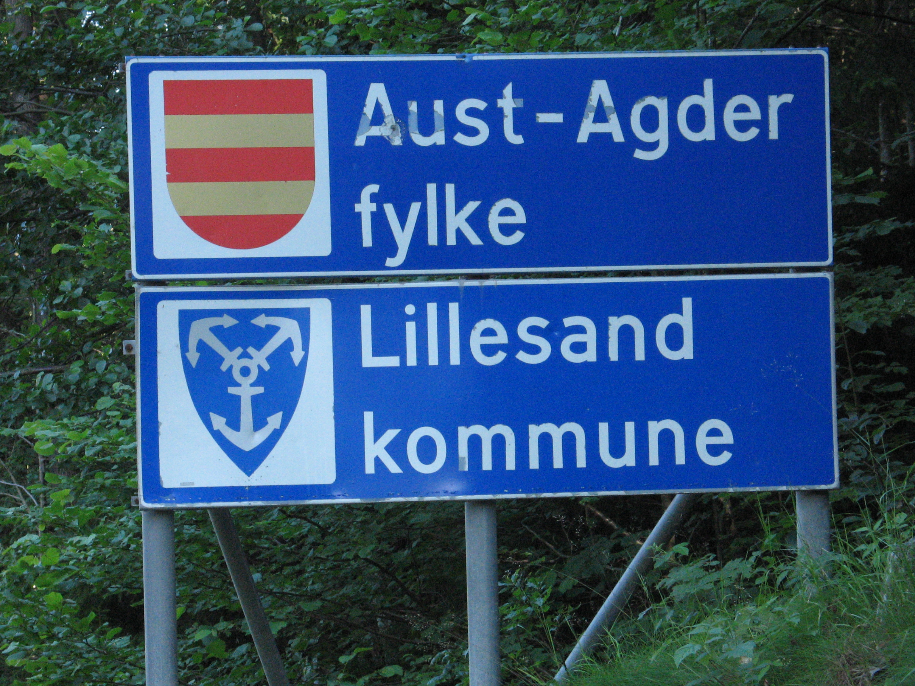 Skilt som markerer fylkes- og kommunegrense mellom Kristiansand og Lillesand